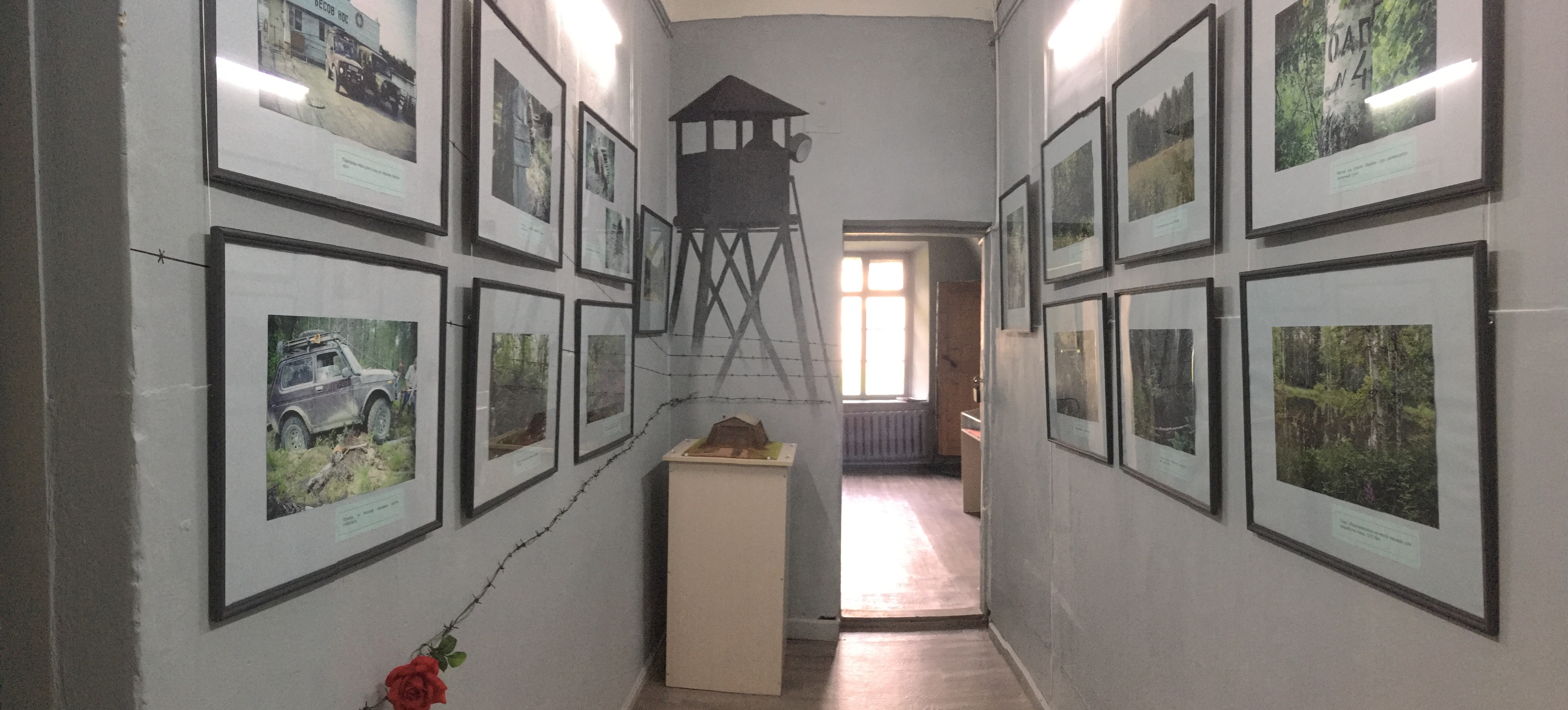 выставка в музее